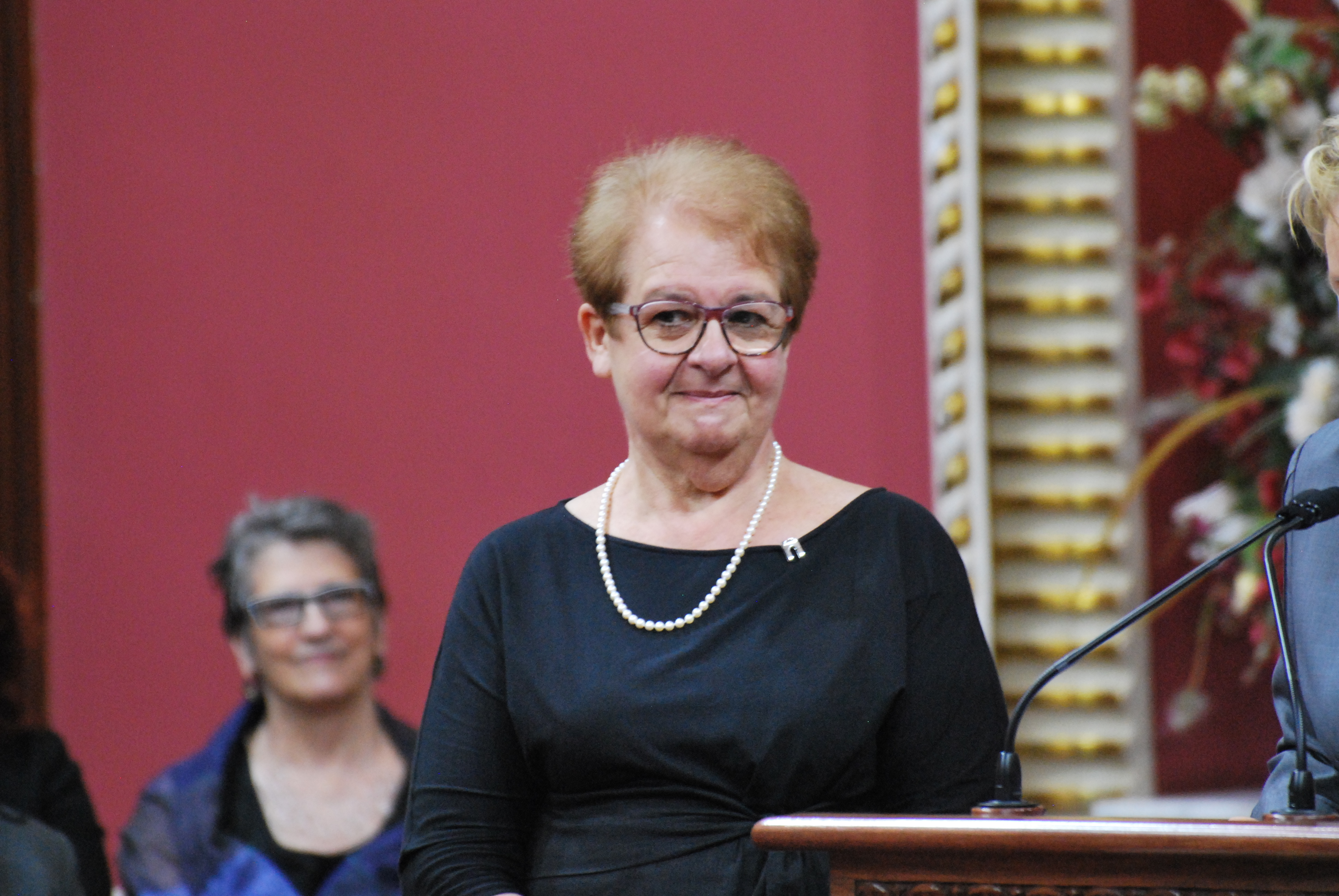 Cérémonie de remise de l'ordre national du Québec 2013.